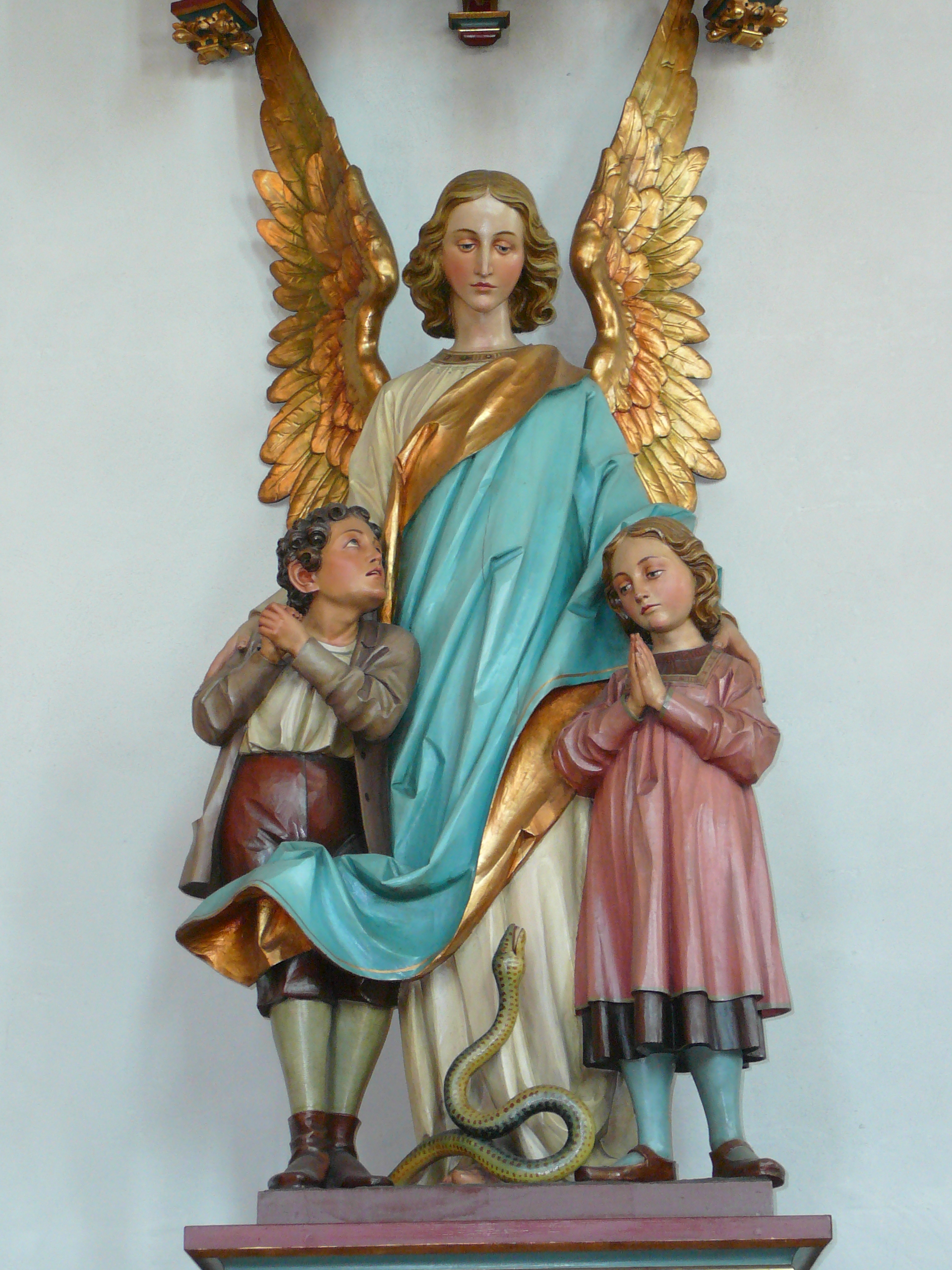 Dreifaltigkeitskirche Bülach Blick, Schutzengel